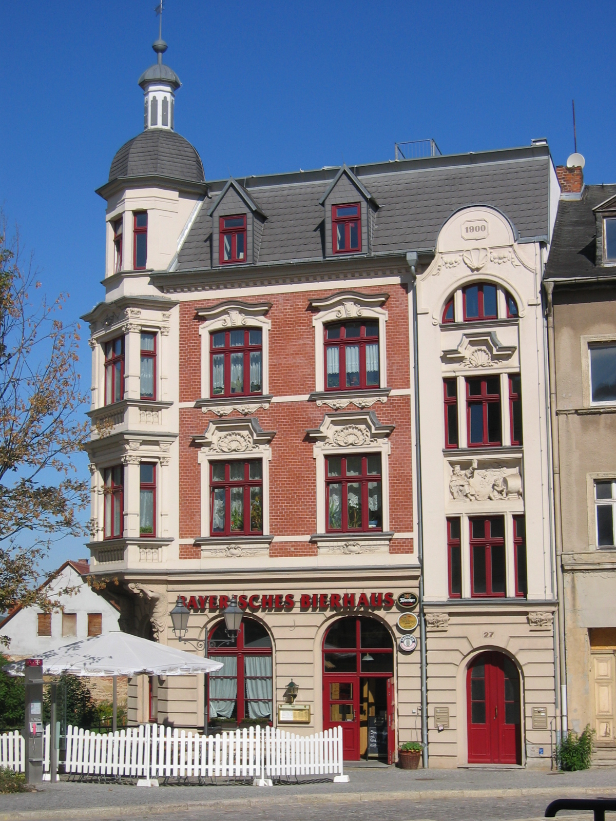 Zeitz Bayrisches Bierhaus